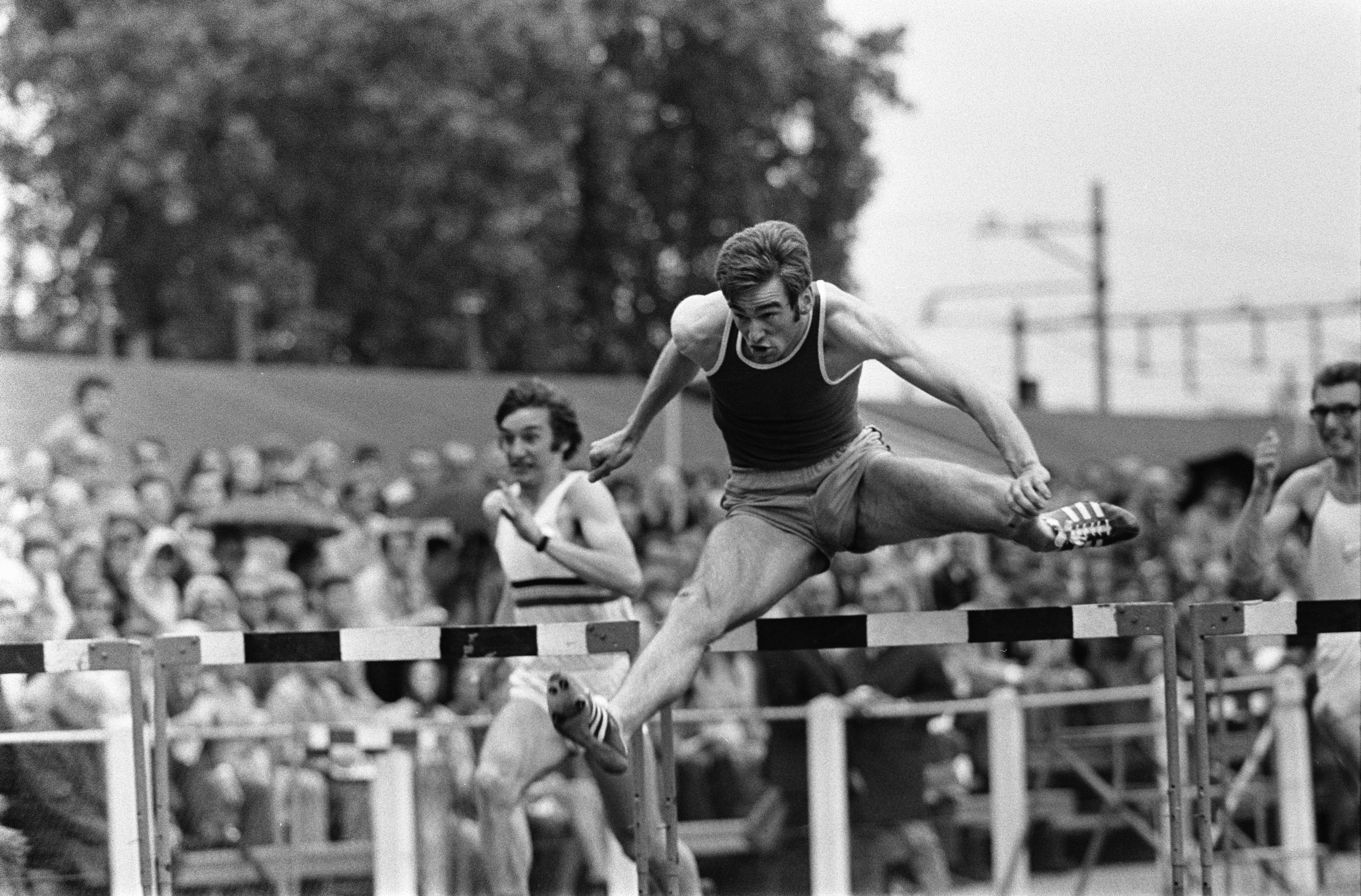 Collectie / Archief : Fotocollectie Anefo Reportage / Serie : Internationale Atletiekwedstrijden op Nenijtobaan, Rotterdam; H. van Enkhuizen , in aktie Beschrijving : De Nederlandse hordeloper Hans van Enkhuizen in aktie Datum : 4 juli 1970 Locatie : Rotterdam, Zuid-Holland Trefwoorden : atletiek Persoonsnaam : Enkhuizen, Hans van Instellingsnaam : Nenijtobaan Fotograaf : Fotograaf Onbekend / Anefo, [onbekend] Auteursrechthebbende : Nationaal Archief Materiaalsoort : Negatief (zwart/wit) Nummer archiefinventaris : bekijk toegang 2.24.01.05 Bestanddeelnummer : 923-6451